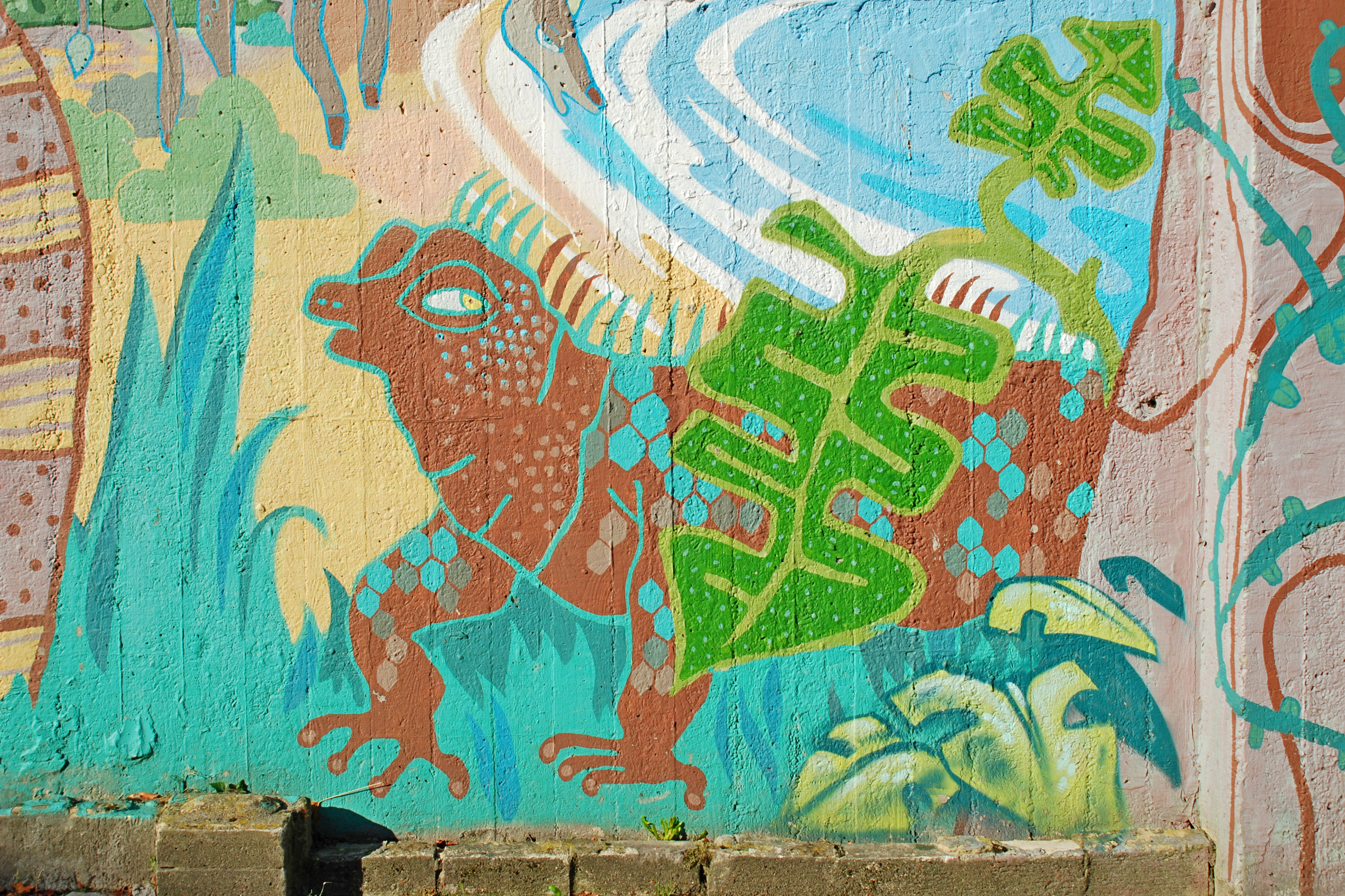 Belgique - Louvain-la-Neuve - Place des Wallons - peintures murales This photo of immovable heritage has been taken in the Walloon Region